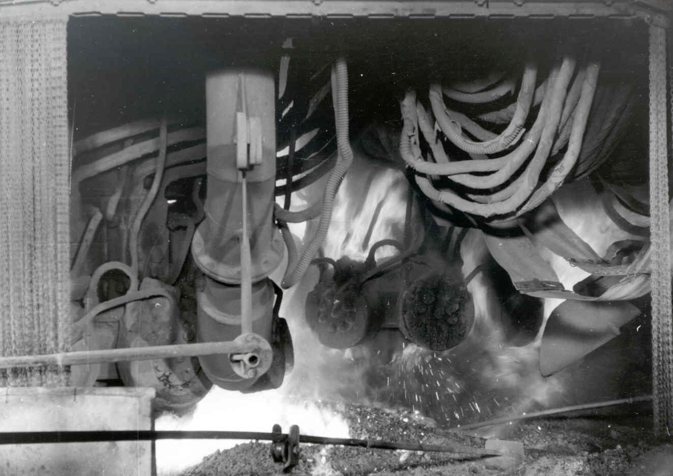 Carbidofen; Aktien-Gesellschaft für Stickstoffdünger in Knapsack -heute Chemiepark Knapsack, Huerth, Germany